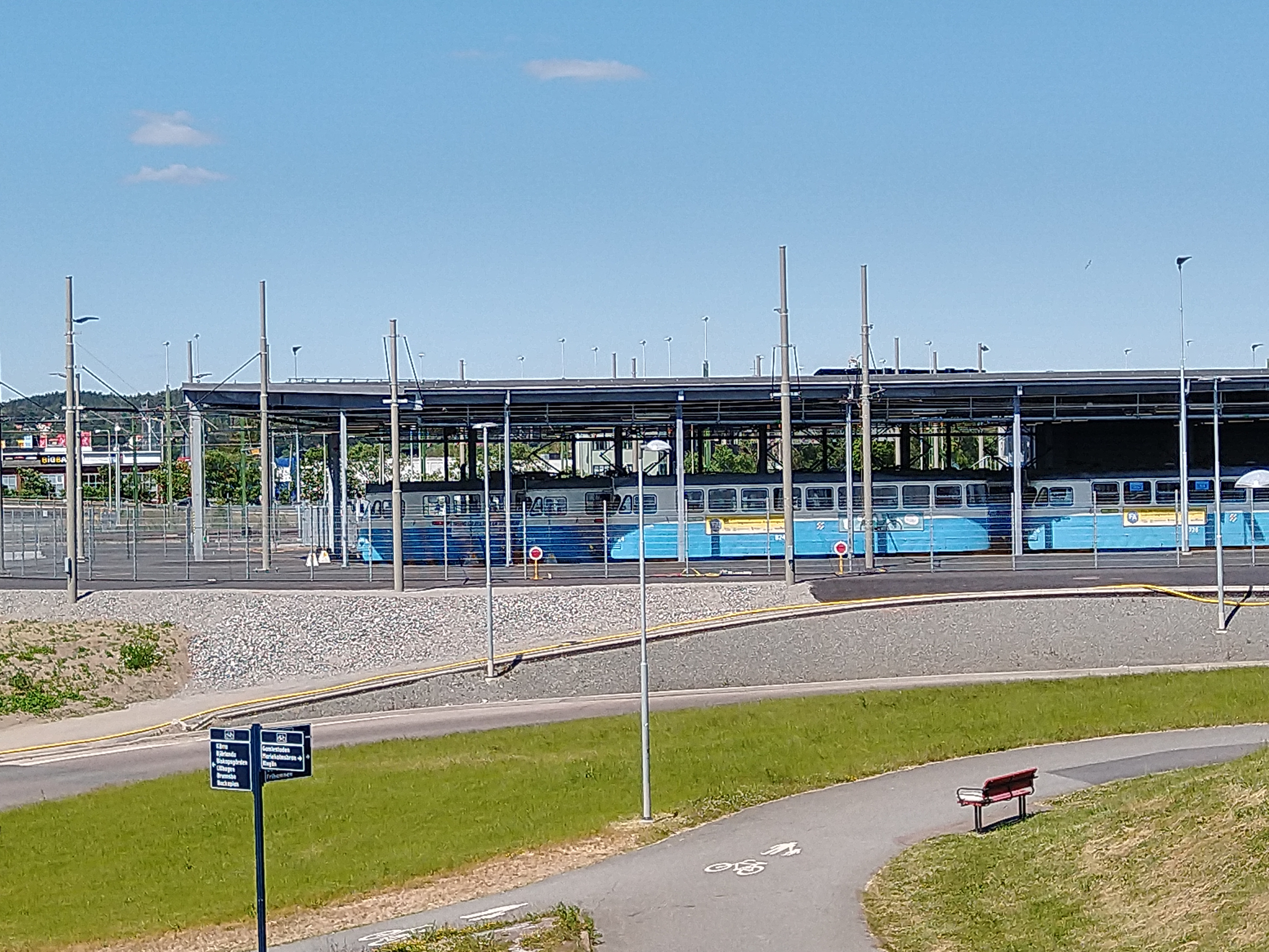 Vagnhallen Ringön, Göteborg. Från sydost. Spårvagnshall.